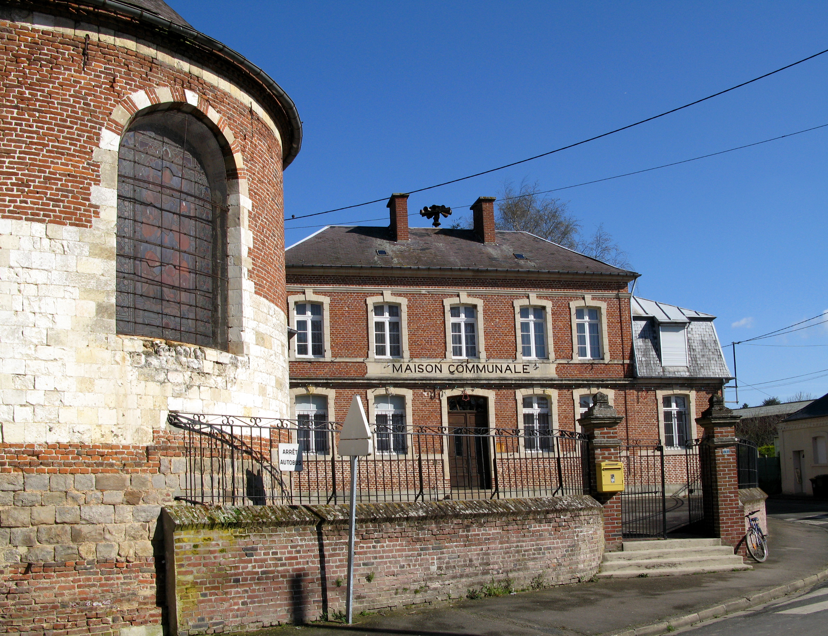 Warloy-Baillon (Somme, France) - La Mairie et le chevet de l'église, dont les murs reposent sur une épaisse ceinture de grès d'environ un mètre de hauteur.